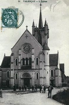 Kirche_von_Valençay_auf_alter_Postkarte